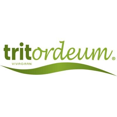 logo Tritordeum entreprise Agrasys